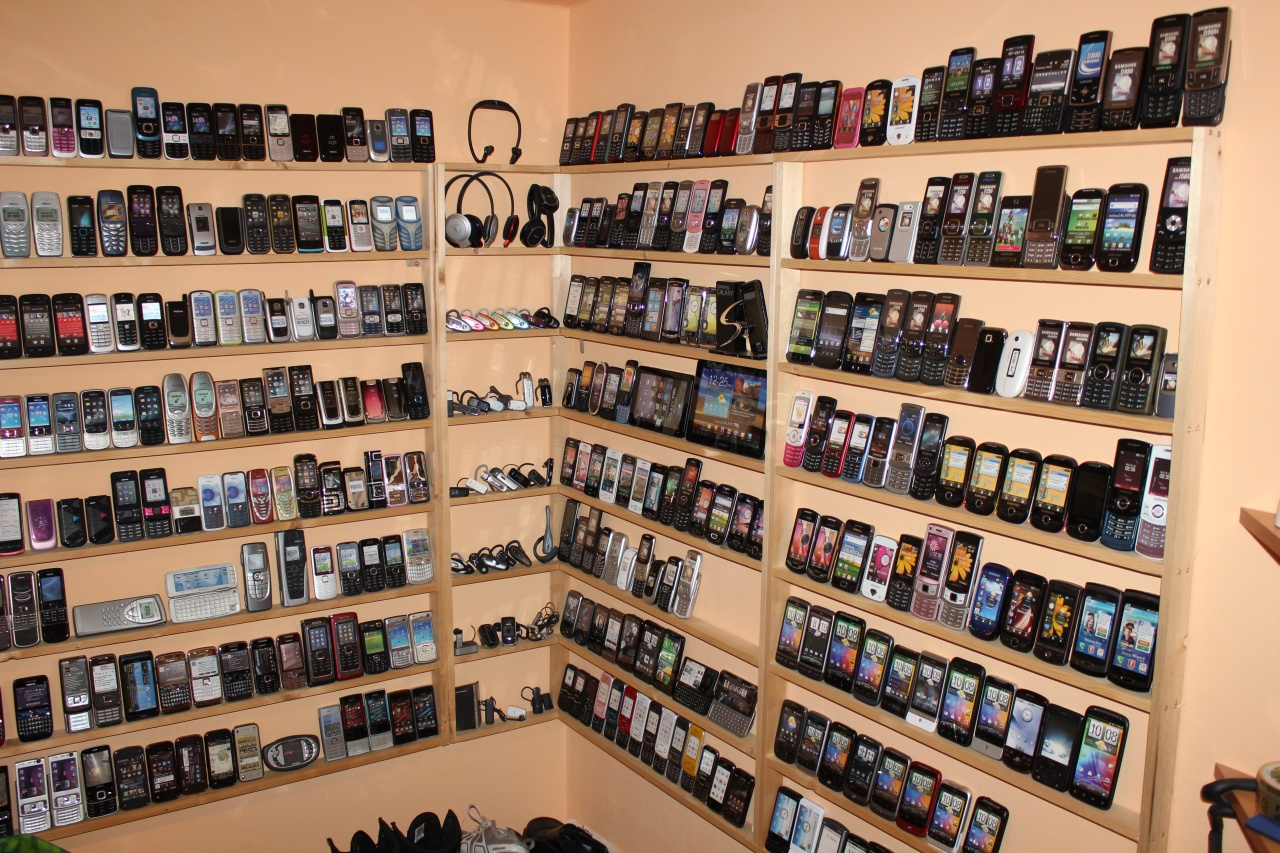 ukázka maket mobilních telefonů